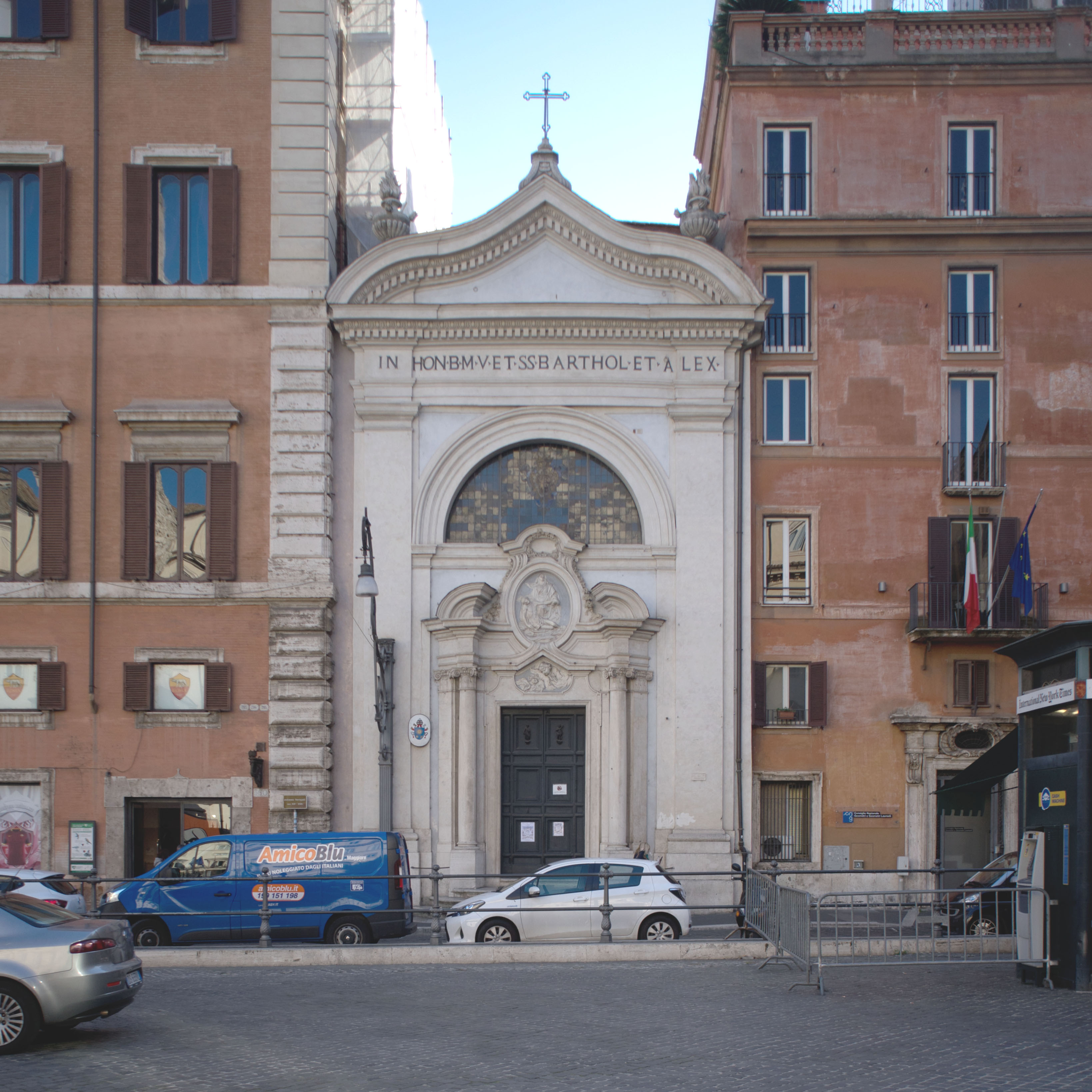 Facciata della chiesa di Santi Bartolomeo e Alessandro dei Bergamaschi